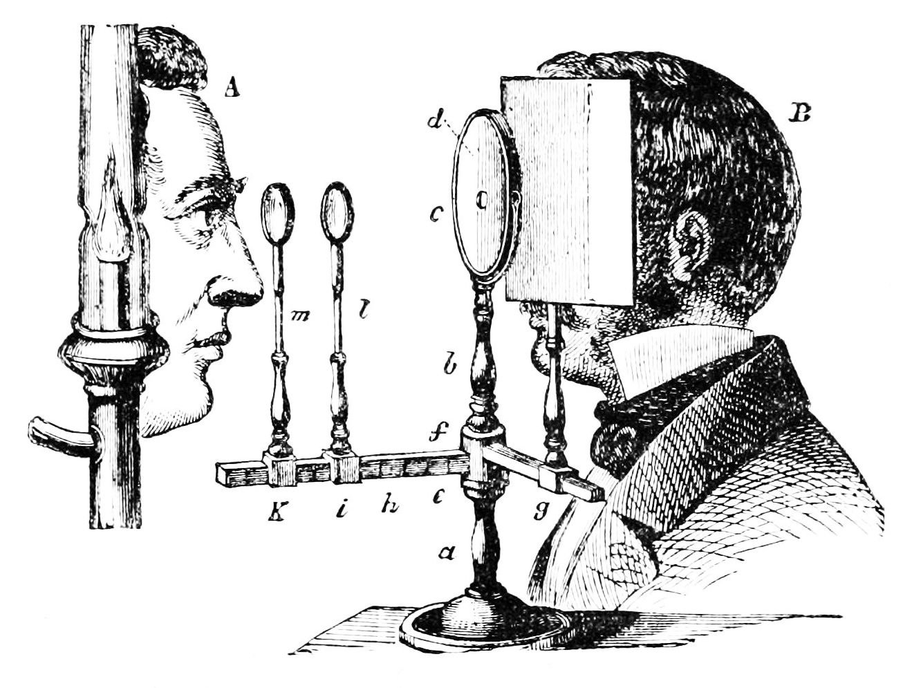 Ophtalmoscope